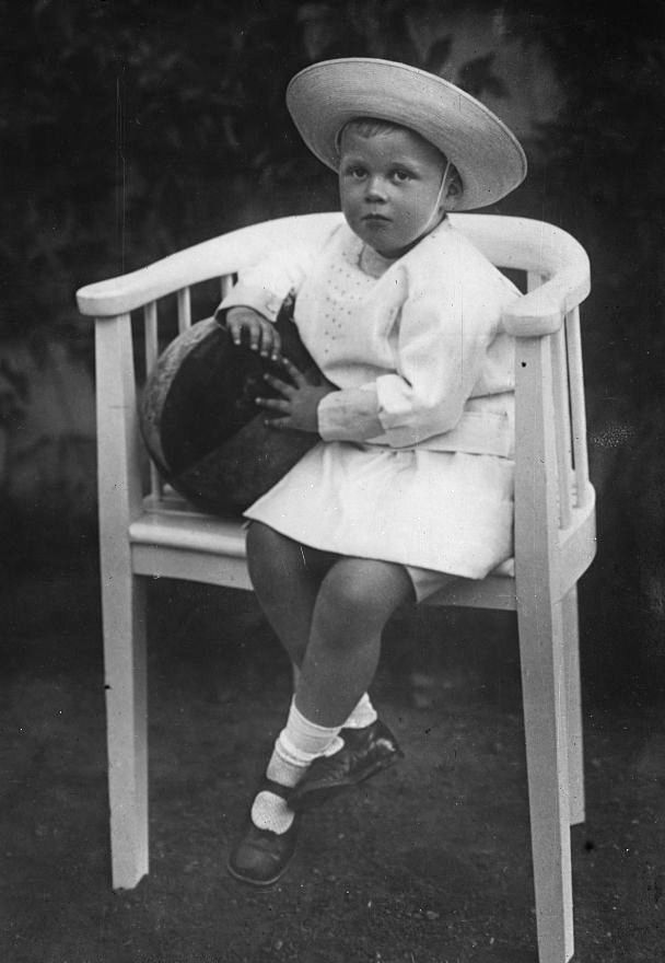 Friedrich Franz (V), Hereditary Grand Duke of Mecklenburg-Schwerin (1910-2001)